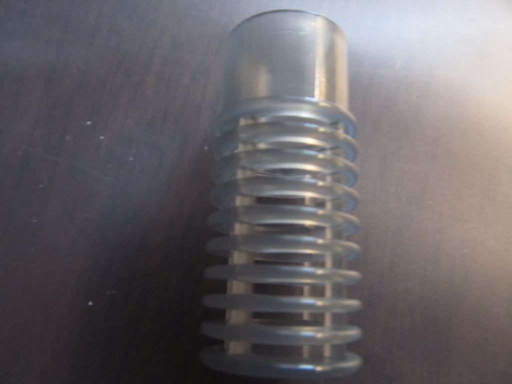 ジェックス・外掛け式スリムフィルター「スリムフィルターＳＳ」ストレーナー